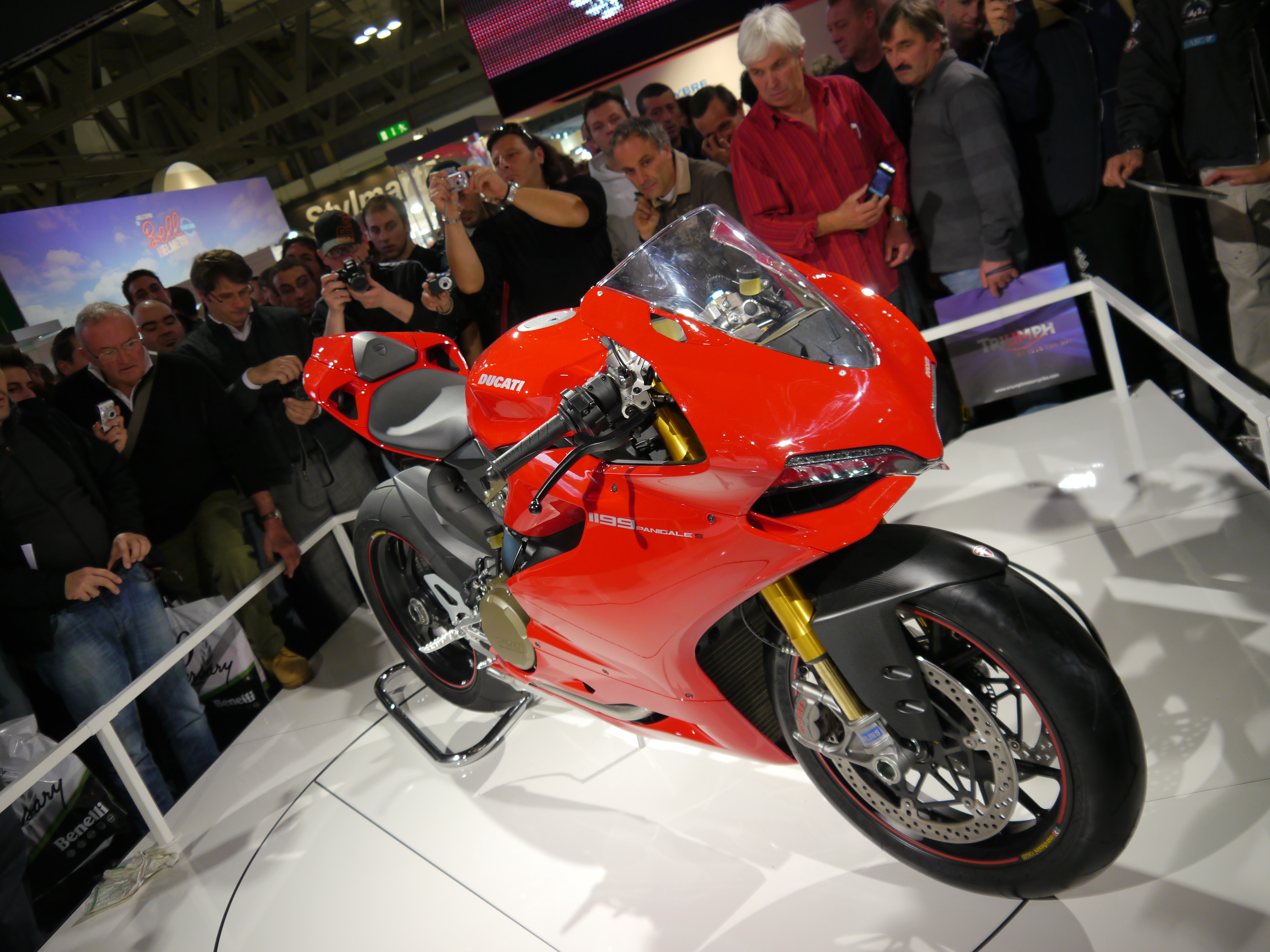 Ducati 1199 Panigale S